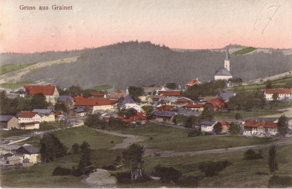 Postkarte Gruss aus Grainet, coloriert